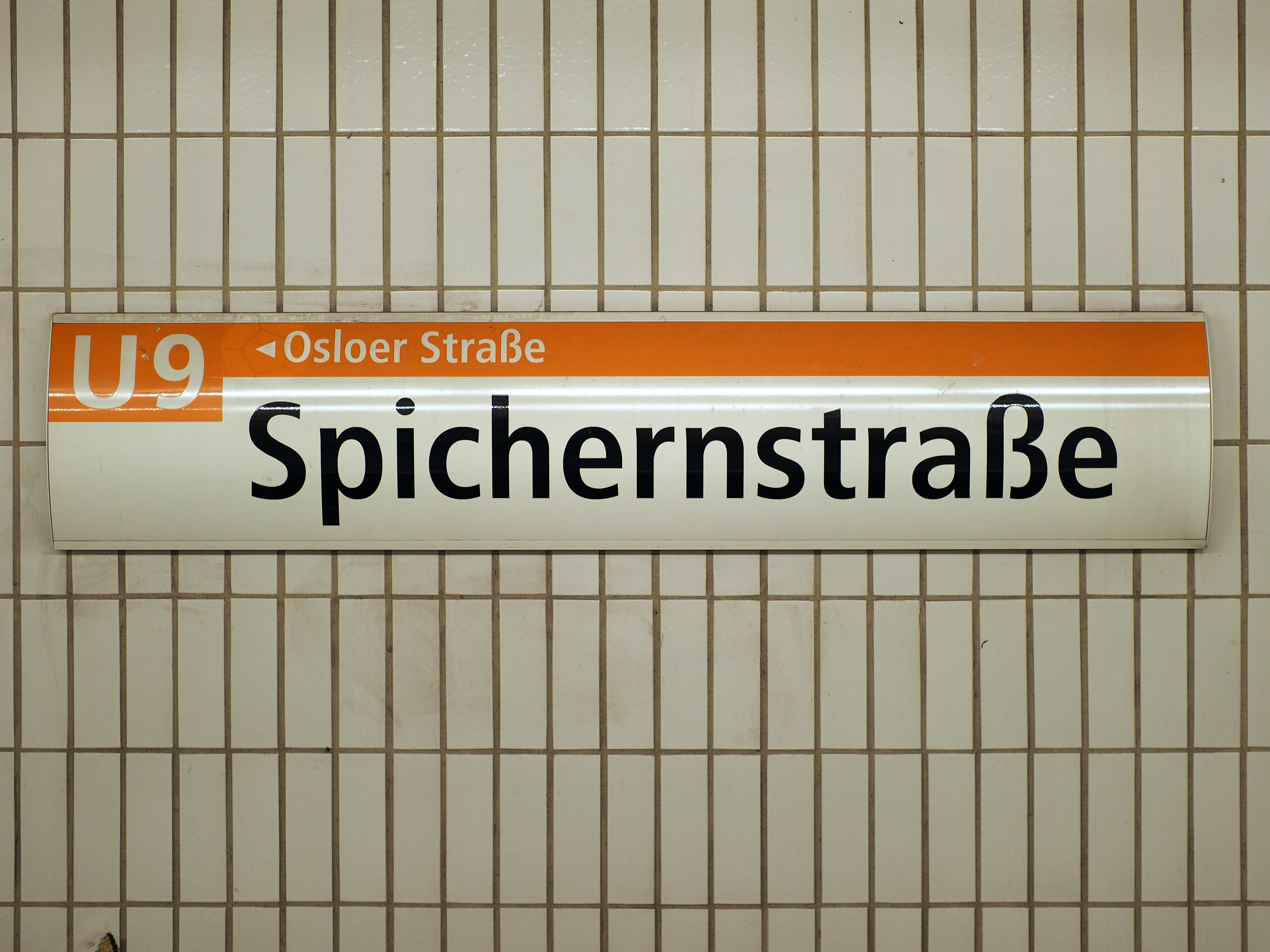 Namenszug an der Wand des U-Bahnhofs Spichernstraße in Berlin-Wilmersdorf